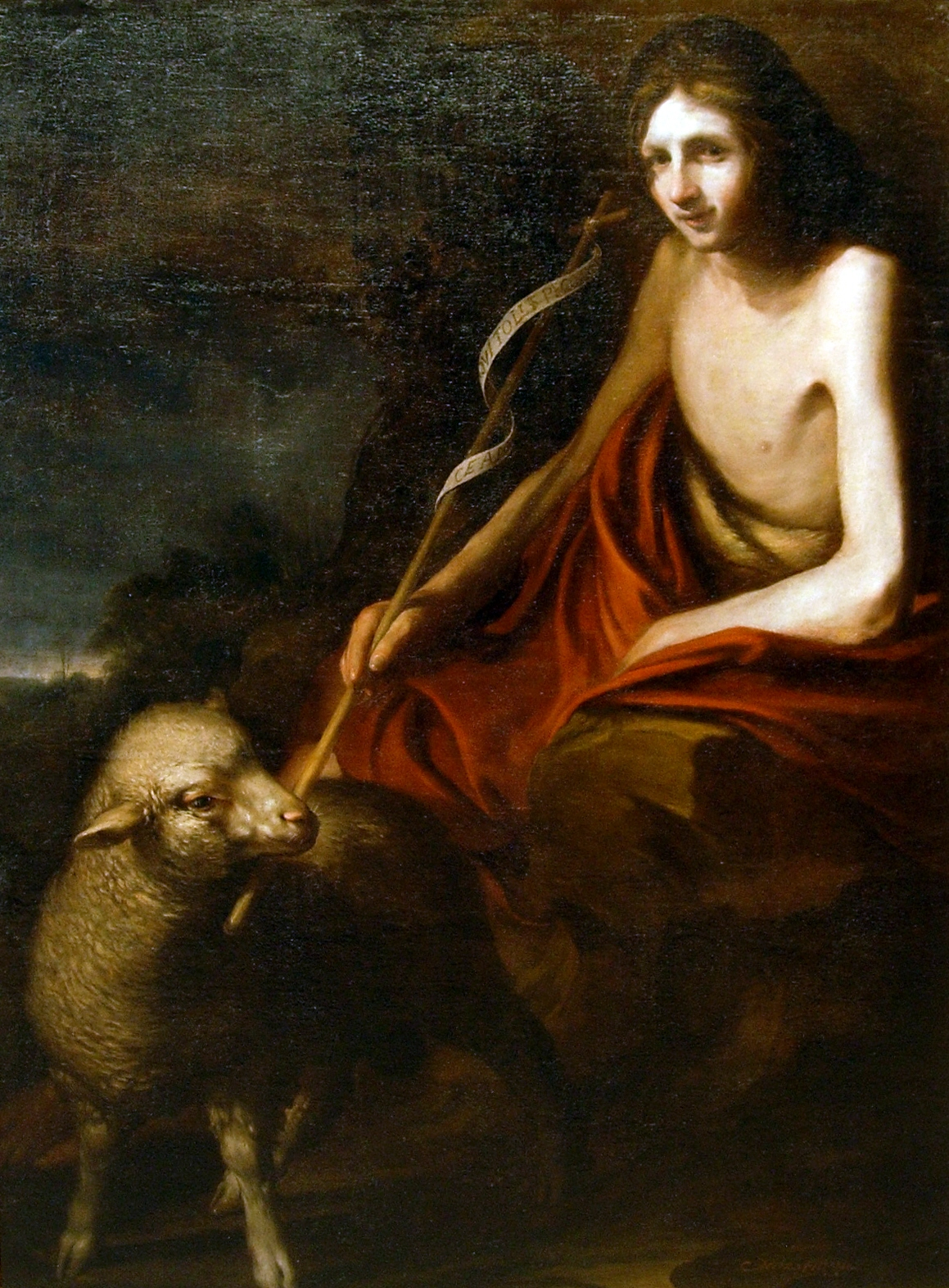 La obra representa al profeta San Juan Bautista, precursor del Mesías.